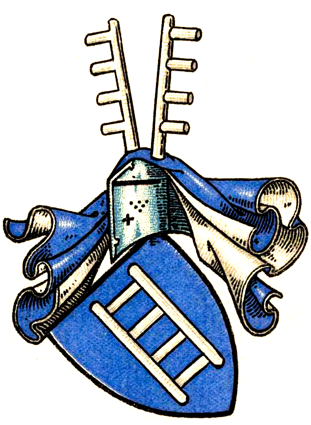 Stammwappen der von Oeynhausen